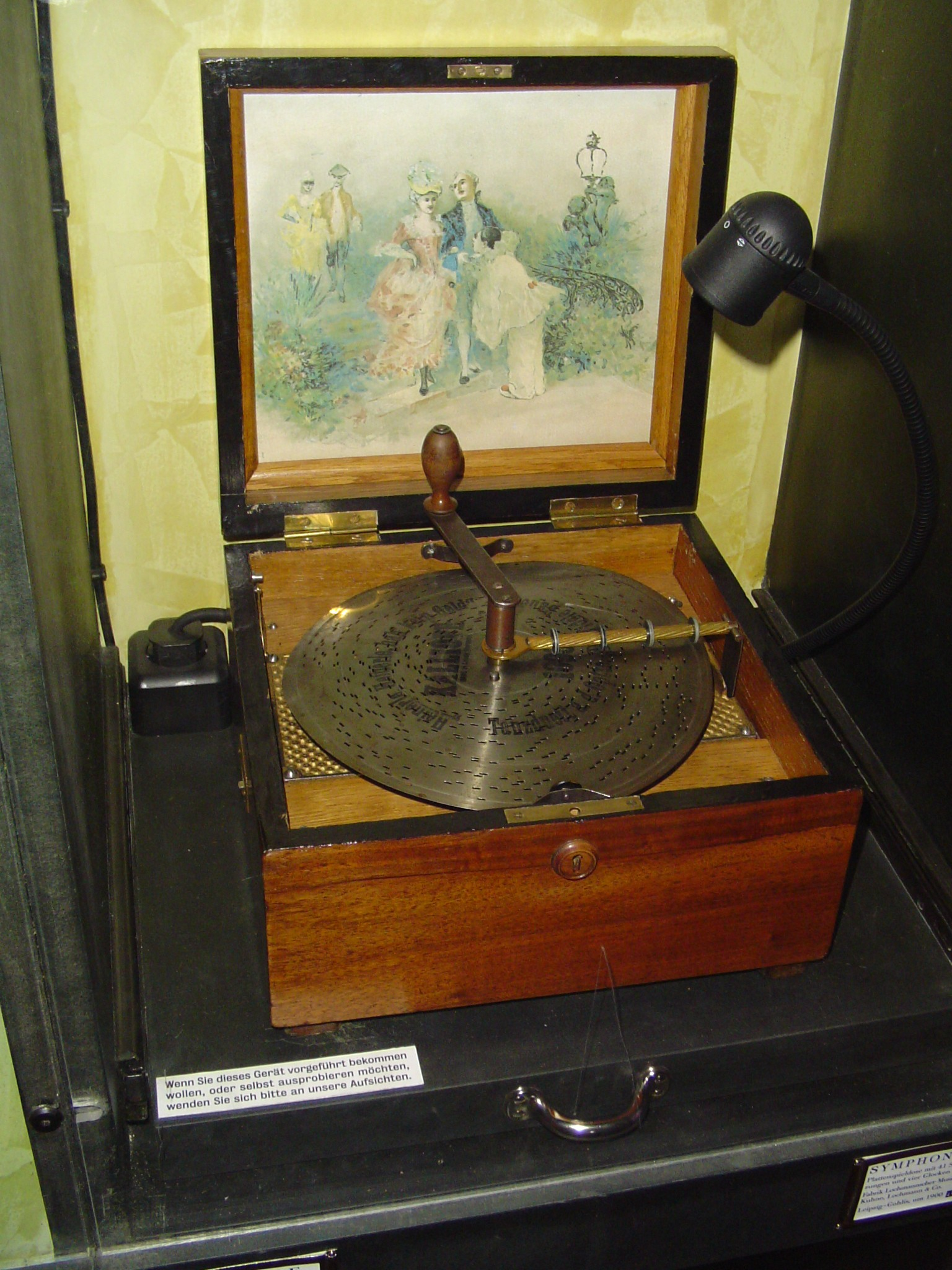 Kalliope Plattenspieldose mit 48 Stahlzungen/ Leipzig-Gohlis um 1905